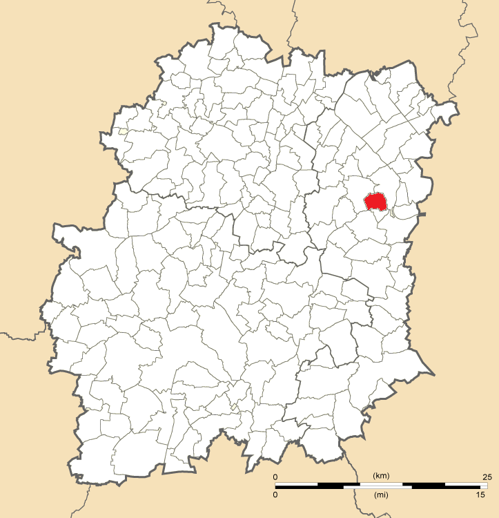 Carte de position de Villabé en Essonne (91)